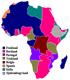 Føroyskt: Afrika í 1914.